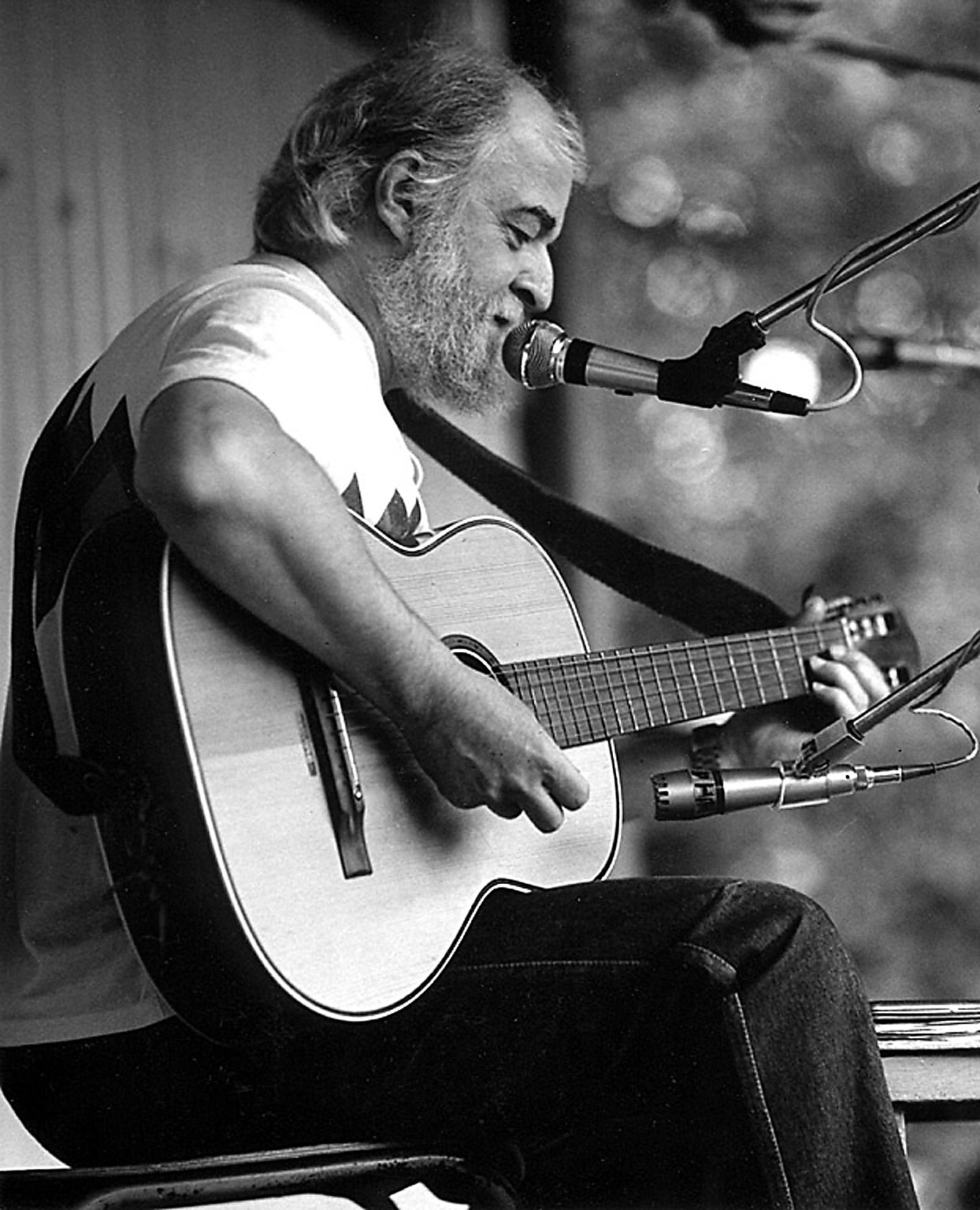 Svojšice